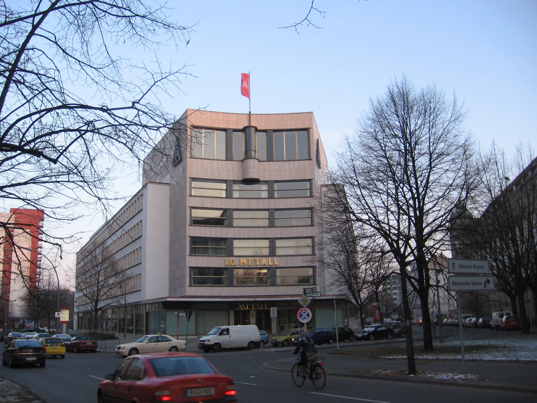 IG-Metall-Haus, Berlin